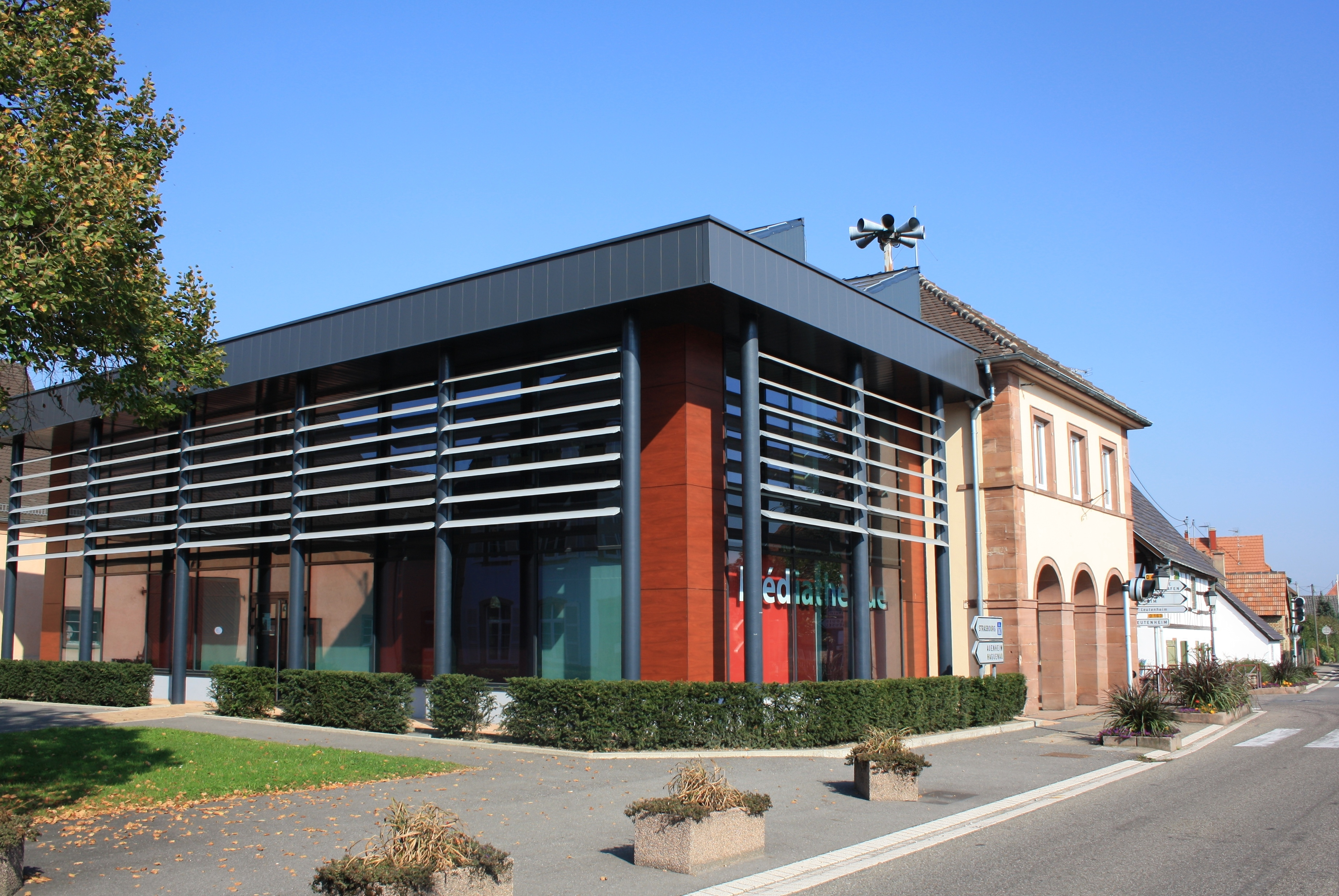 La Médiathèque de Rœschwoog